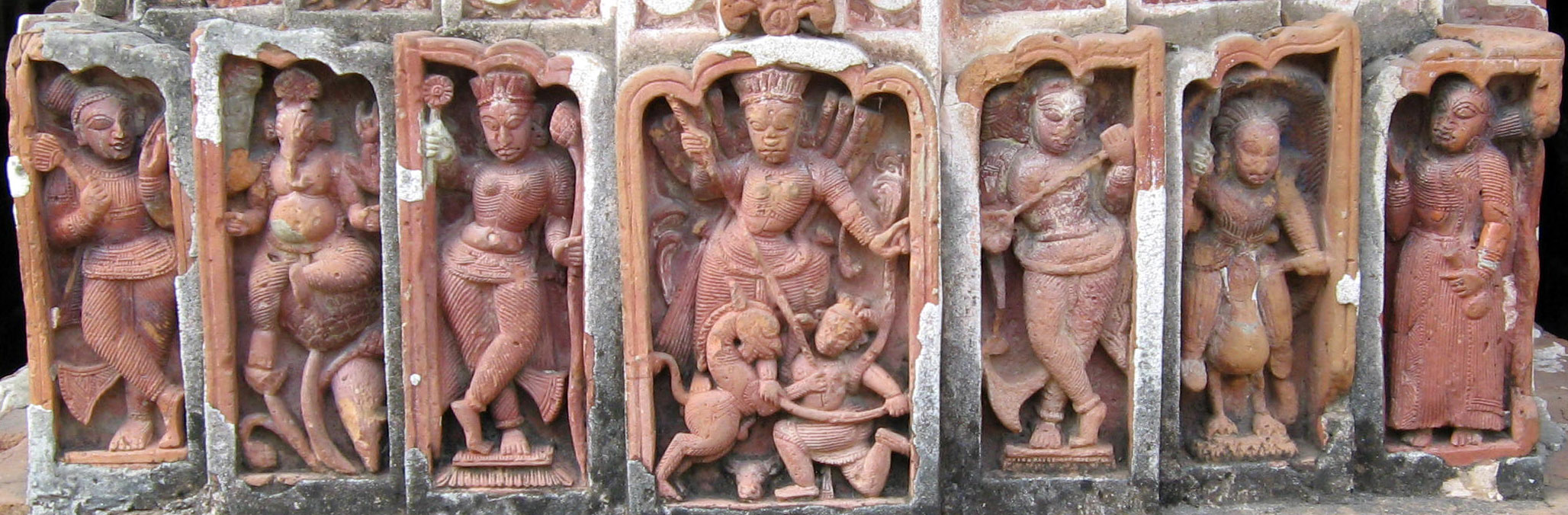 terracotta carvings on Antpur Radhagovindjiu temple. This temple is situated at Antpur(Mitra Bati) in Hooghly District of West Bengal India. The construction of the temple was completed in 1786 AD. আঁটপুরের বিখ্যাত রাধাগোবিন্দজিউ এর মন্দির তৈরি সম্পূর্ণ হয় ১৭৮৬ খ্রীষ্টাব্দে । (১৭০৮ শকাব্দ)। এই মন্দিরটি তৈরি করেছিলেন বর্ধমান রাজের দেওয়ান কৃষ্ণরাম মিত্র । এই ছবিতে দুর্গা ঠাকুরের অসাধারণ একটি টেরাকোটা দেখা যাচ্ছে যেটি মন্দিরের সামনের থামে আছে ।